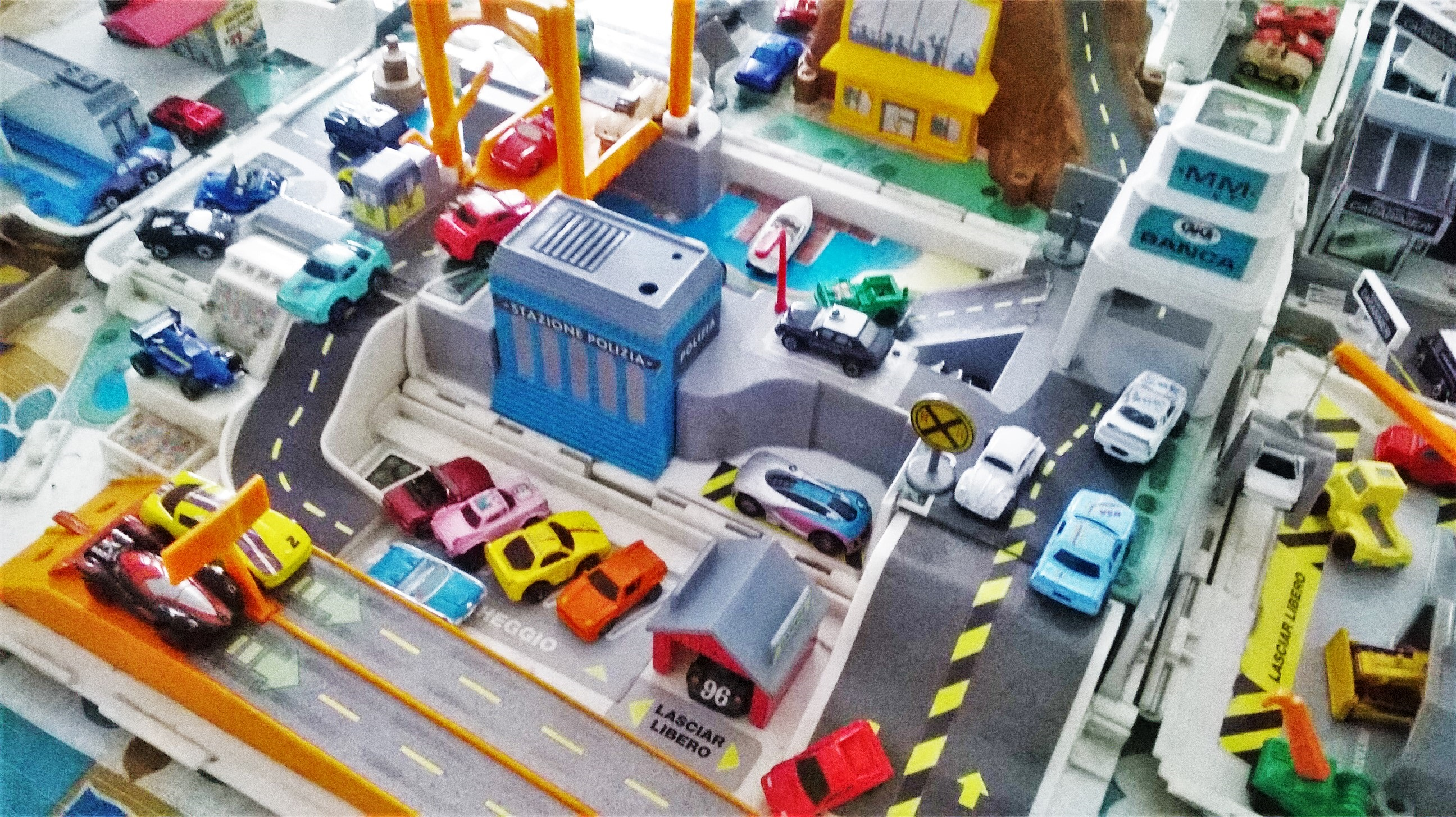 Camper Micro Machines anni 90